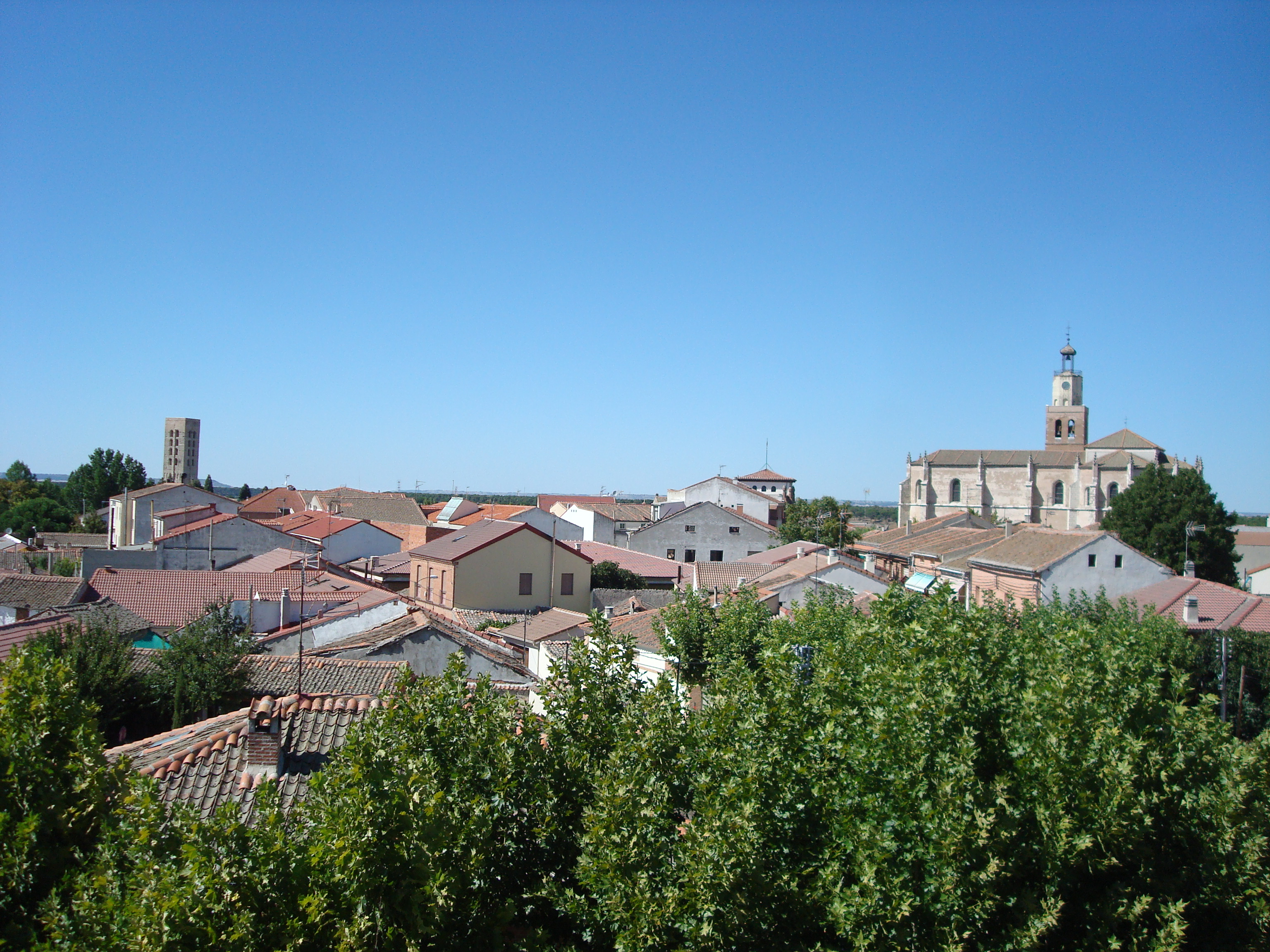 Coca - 039